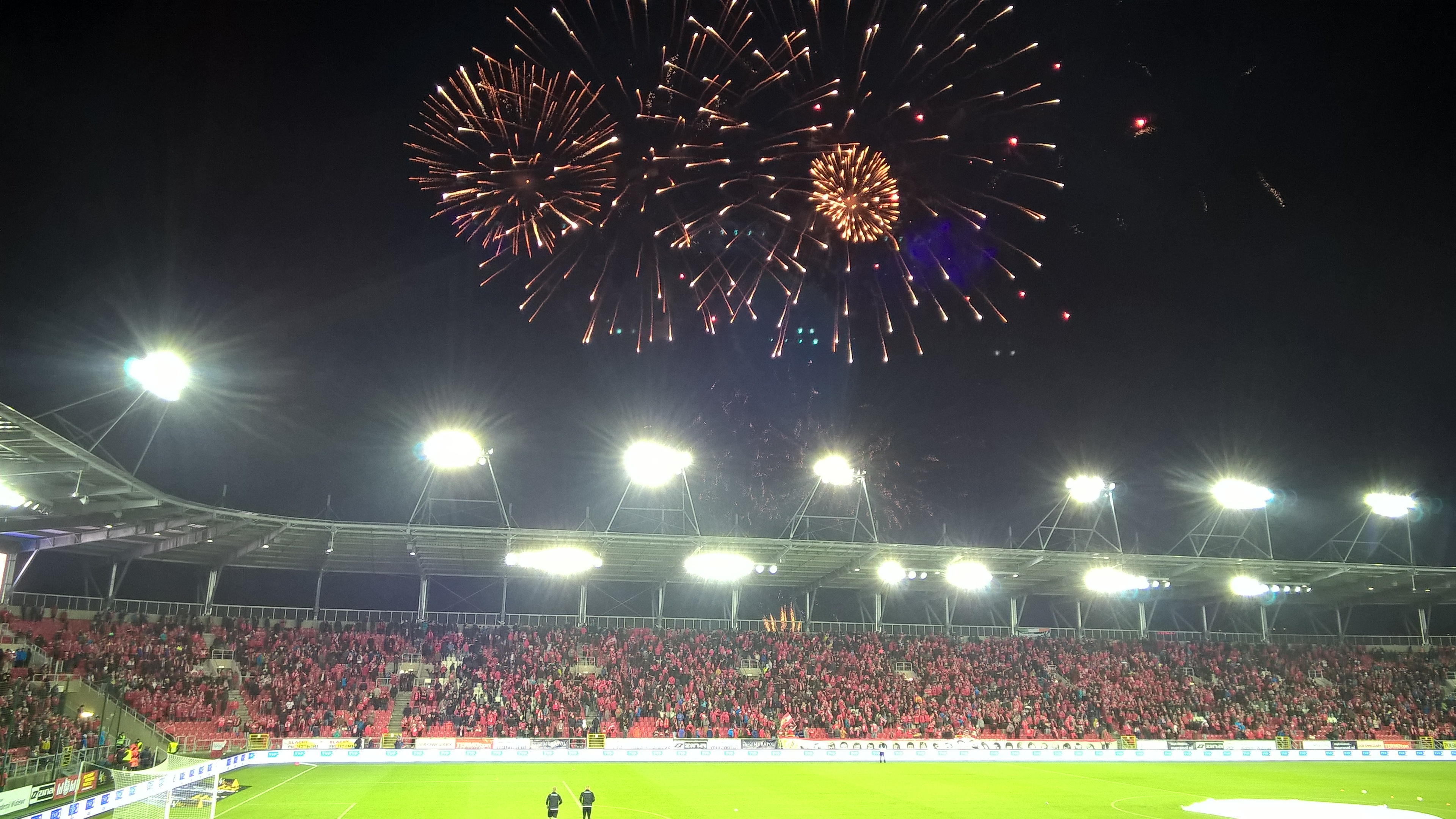 Otwarcie stadionu Widzewa - 18.03.2017